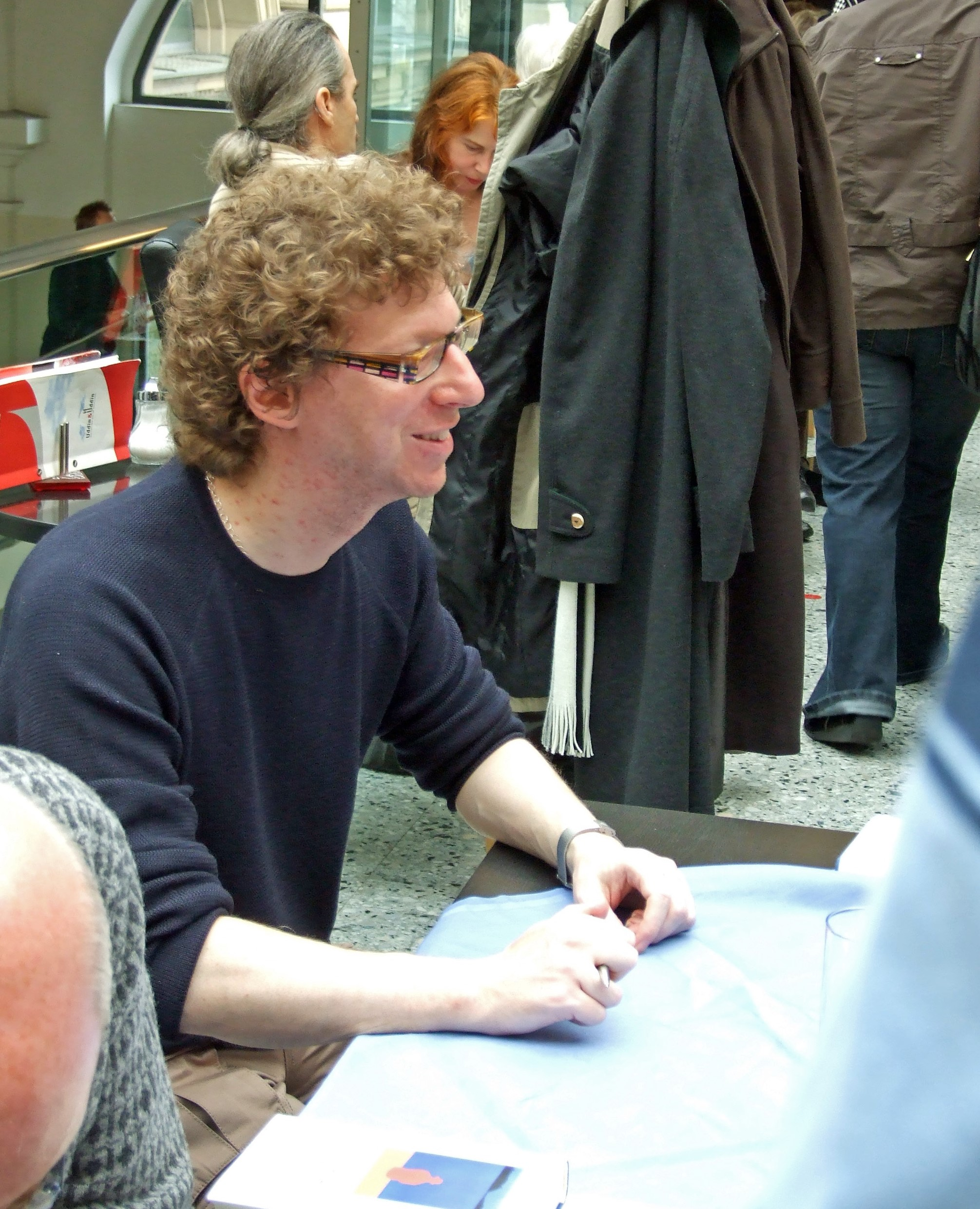 Arnon Grunberg 2008 in Ffm